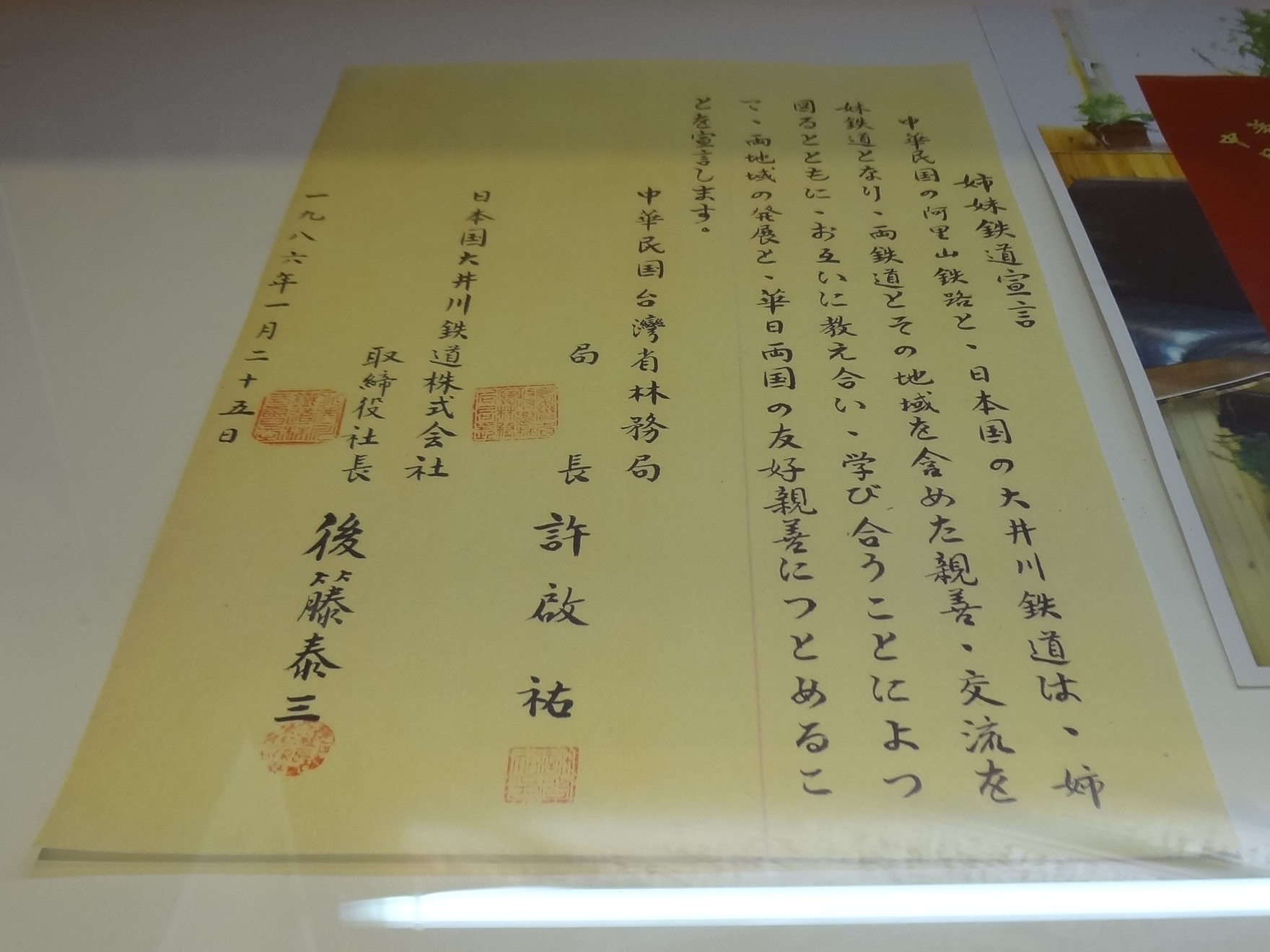 1986年1月25日，阿里山森林鐵路與大井川鐵道締結姐妹鐵路宣言。